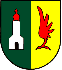 Wappen der Gemeinde Feldkirchen bei Graz in Österreich